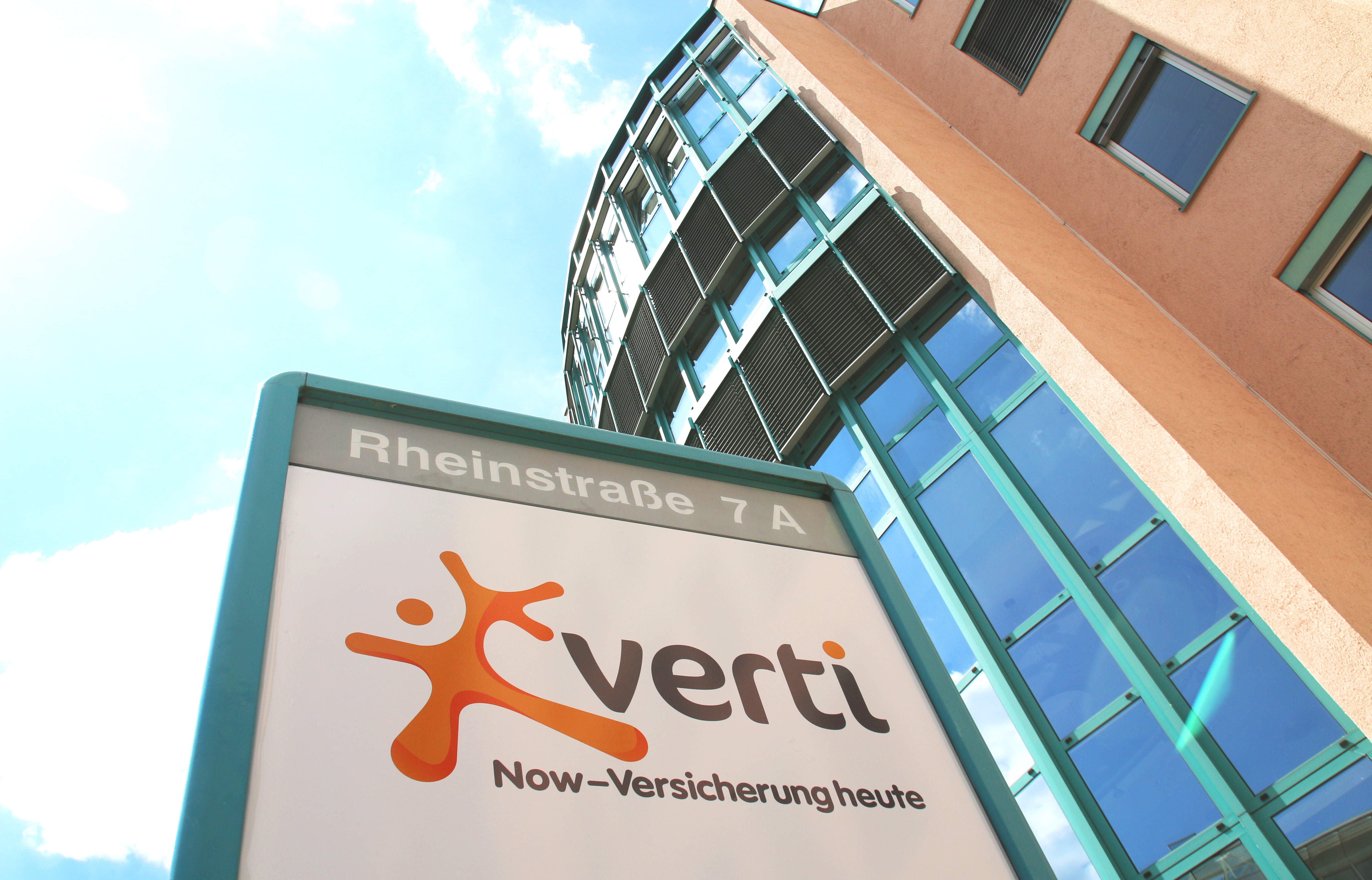 Dieses Gebäude steht in Teltow